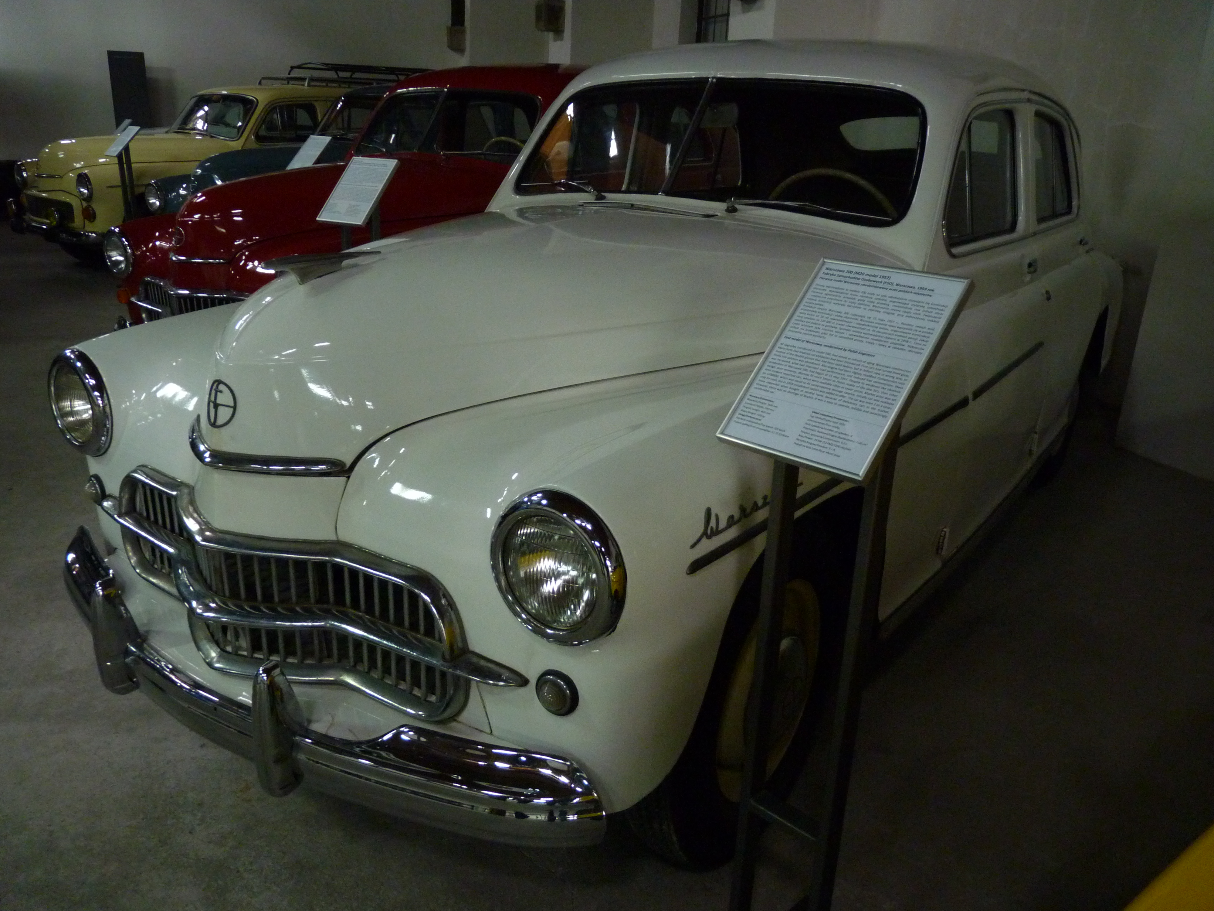 FSO Warszawa M-20-57 in Muzeum Inżynierii Miejskiej in Kraków.